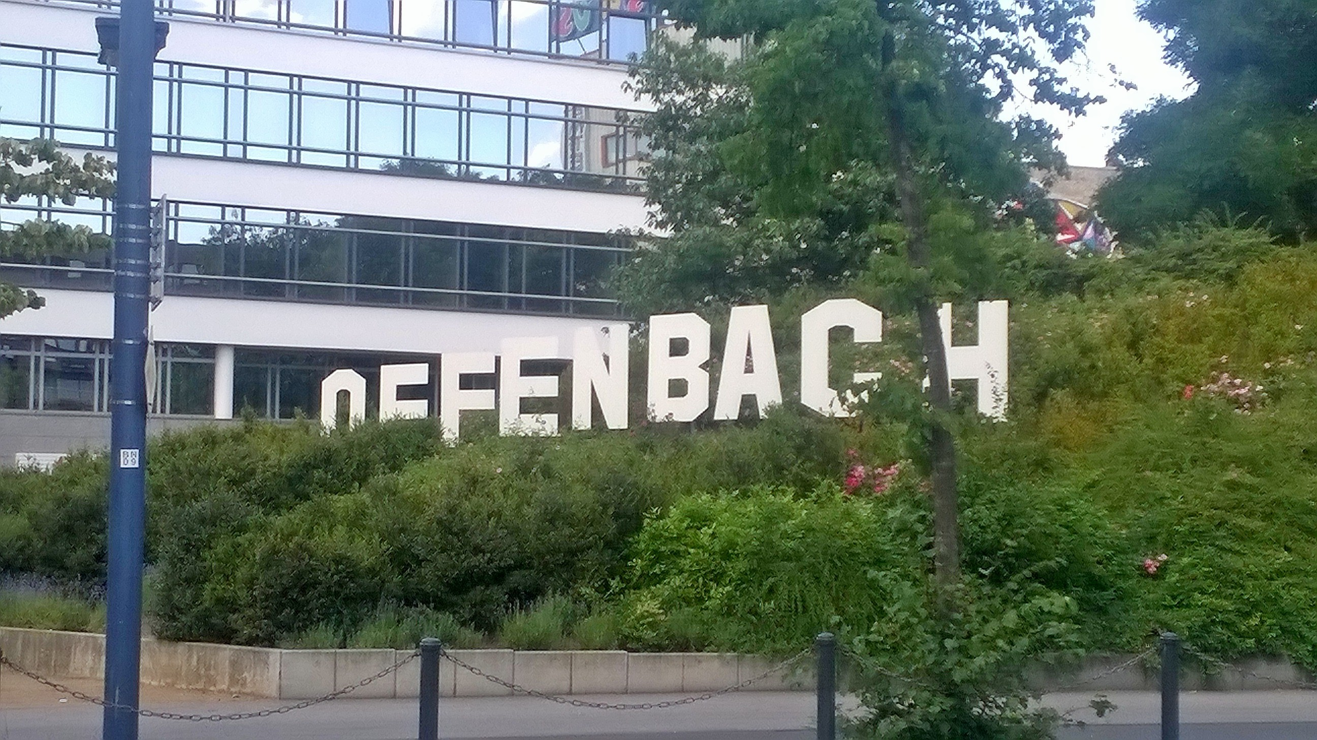 Offenbach Hills